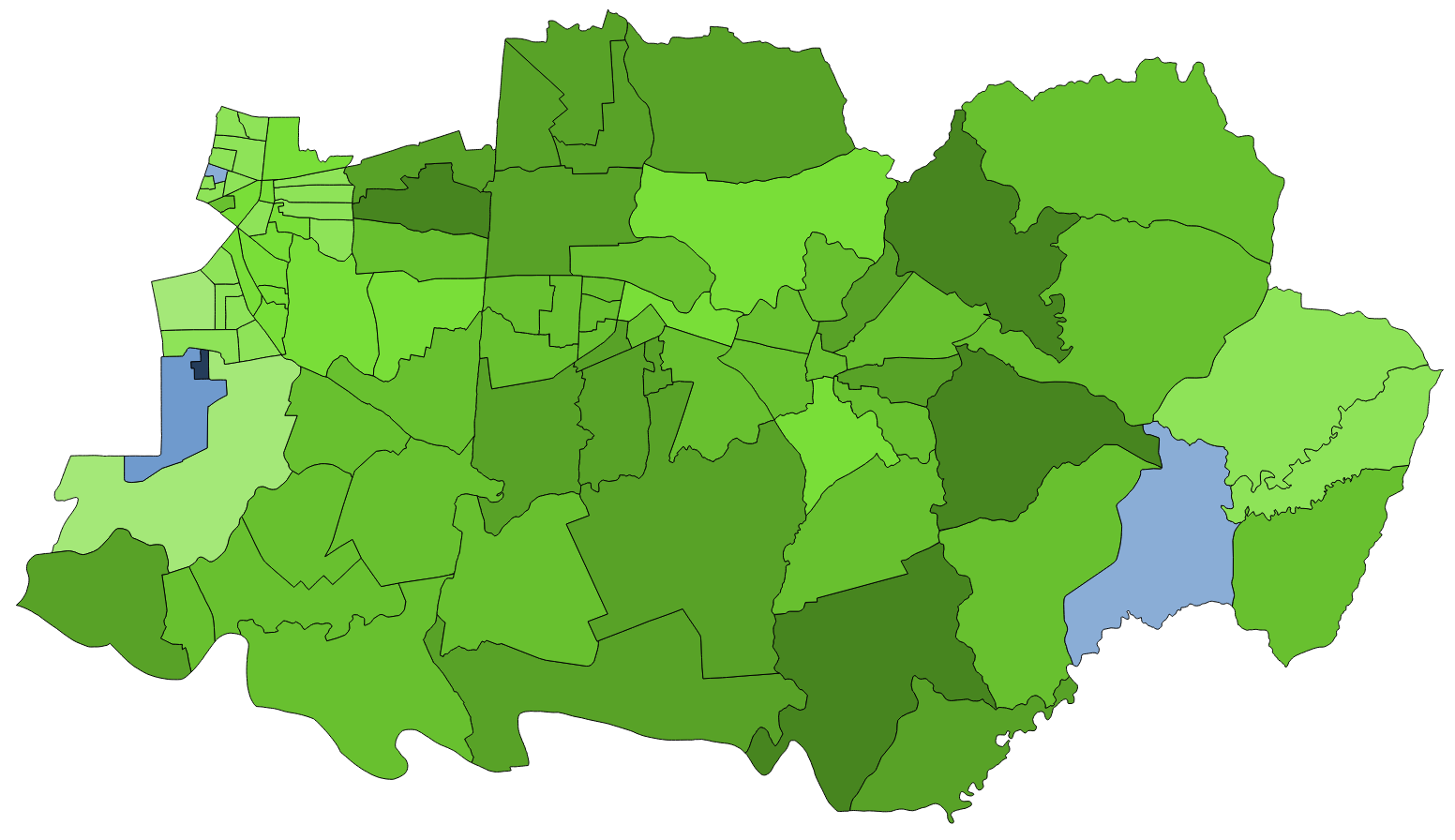 中文（台灣）: 顏色對照表